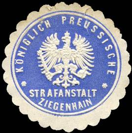 Sealing stamp Title: Königlich Preussische Strafanstalt Ziegenhain Description: blau, weiß, geprägt Place: Ziegenhain size: 3 cm